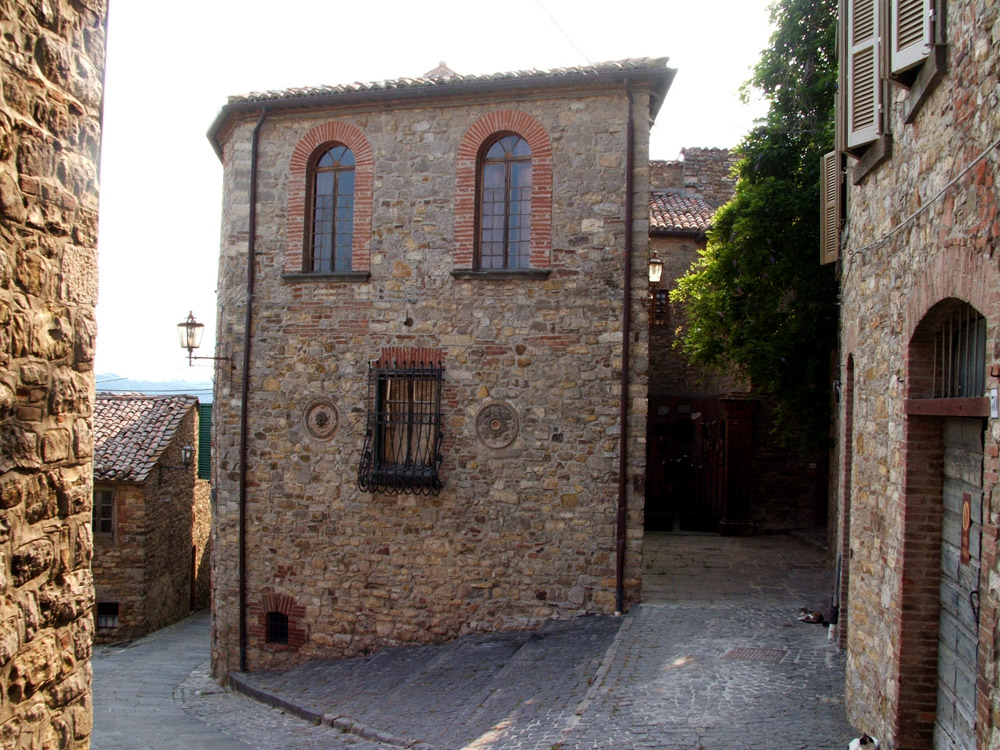 Liliana Gioli